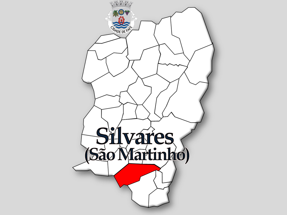 Censos 1864/2011